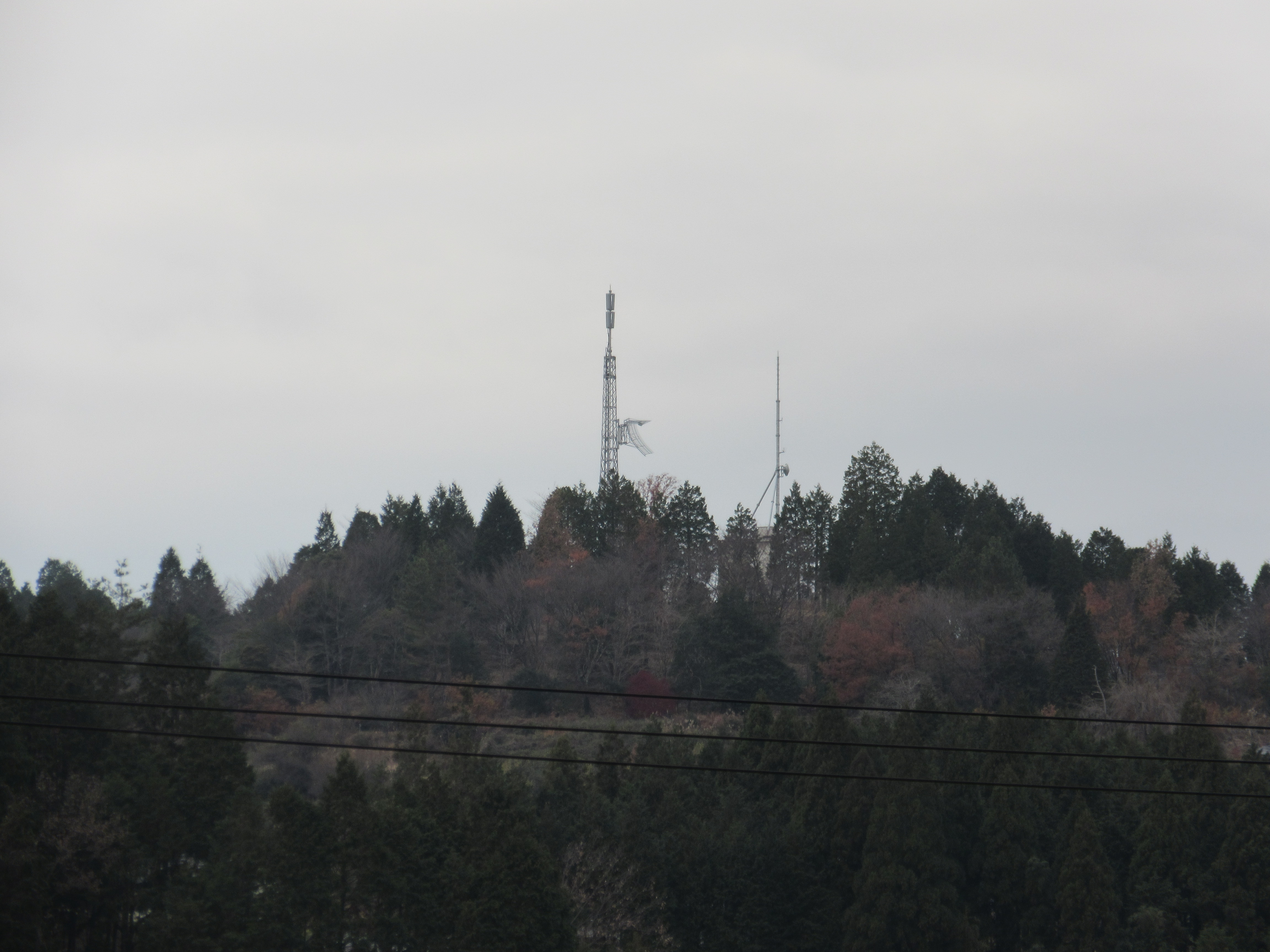 明智テレビ中継局